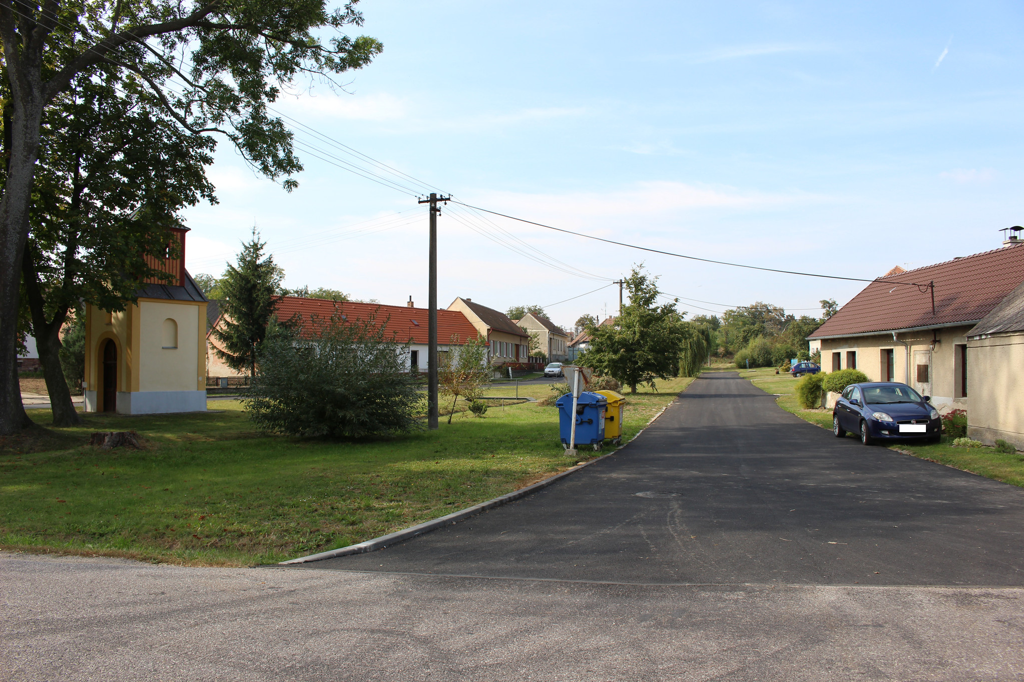 Stupešice, okres Znojmo, Jihomoravský kraj, náves se zvoničkou